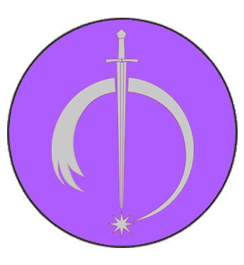 Escudo de Casa Dayne